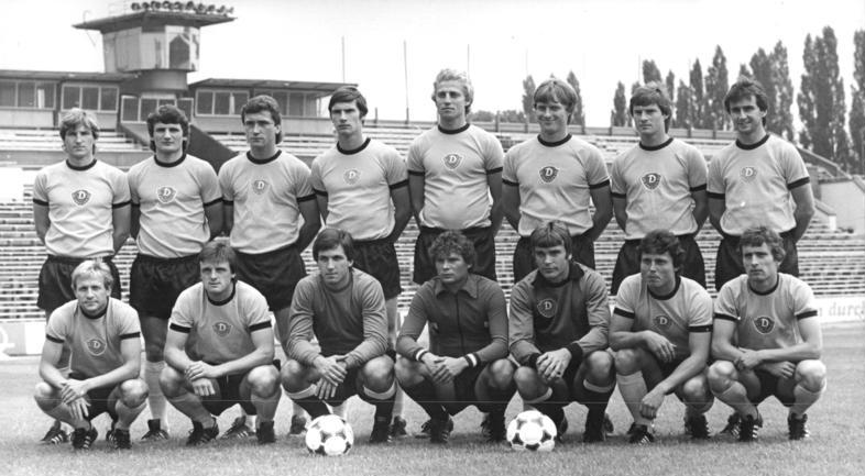 ADN-ZB-Häßler-16.9.80-Dresden: Fußball-Oberliga. Die Mannschaft der SG Dynamo Dresden für die Spielserie 1980-81. Stehend v.l.n.r.: Mannschaftskapitän Hans-Jürgen Dörner, Andreas Schmidt, Gerd Weber, Andreas Trautmann, Karsten Petersohn, Udo Schmuck, Christian Helm und Reinhard Häfner. Vorn v.l.n.r.: Gerd Heidler, Peter Kotte, Torhüter Jörg Klimpel, Torhüter Claus Boden, Torhüter Bernd Jakubowski, Frank Richter und Matthias Müller.